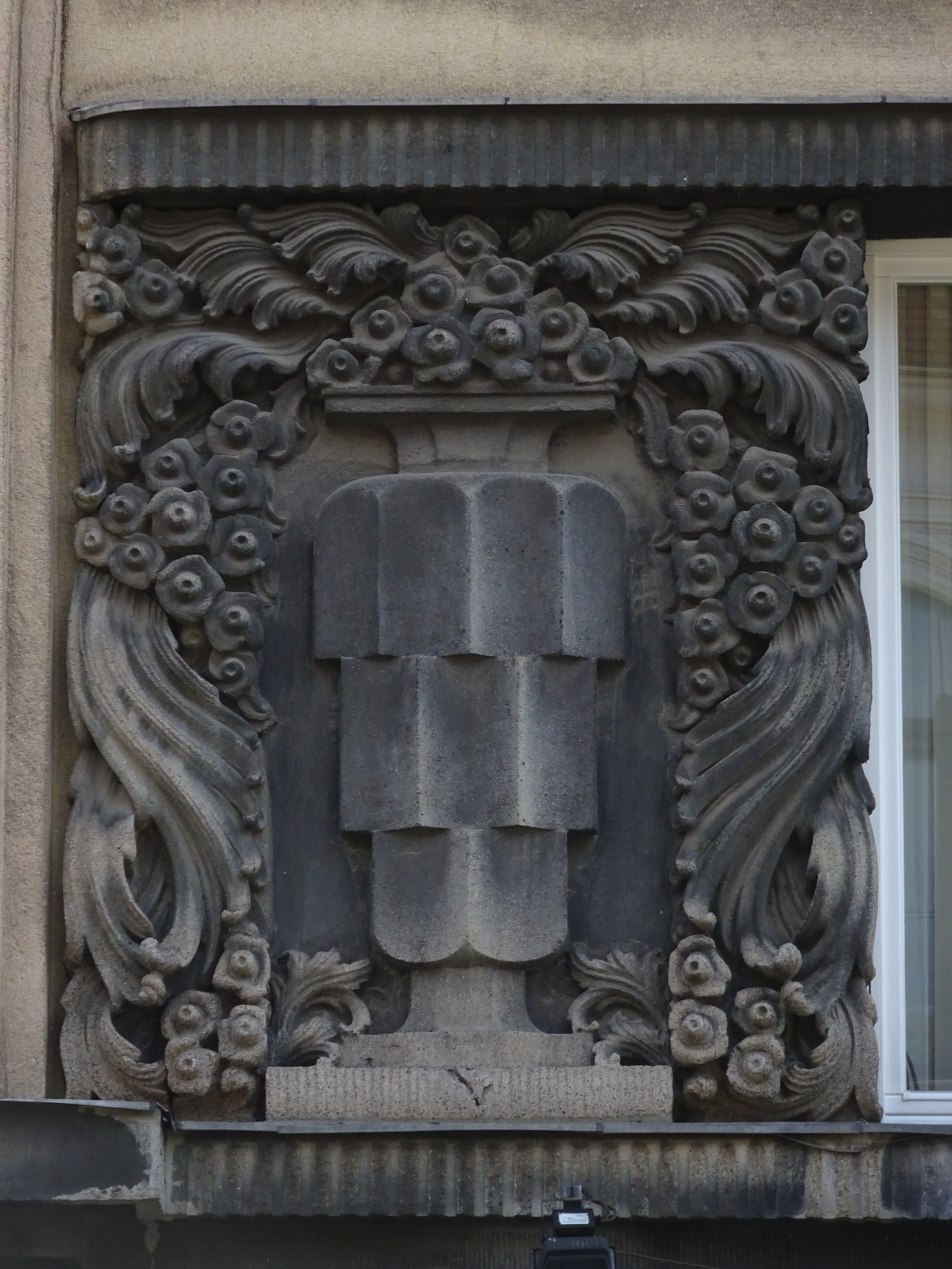 Jedna z czterech płaskorzeźb przedstawiających wazon ze sztucznymi kwiatami autorstwa Franciszka Kalfasa na Kamienicy Fabryki Ćmielów w Krakowie przy Placu Jana Matejki 2.